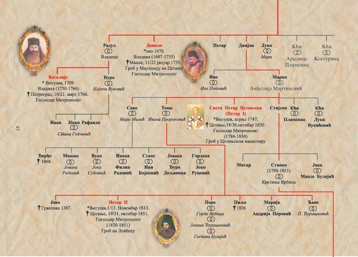 родовід негошів